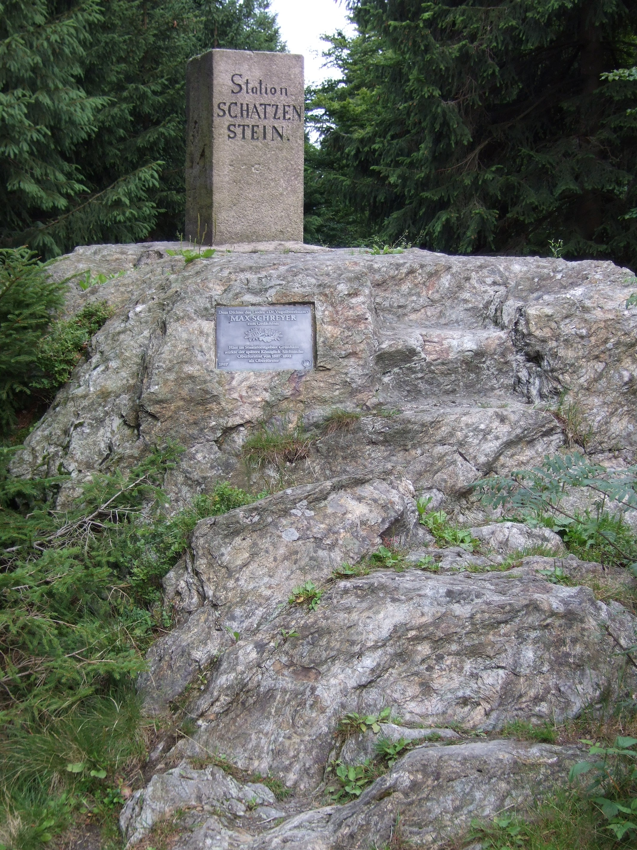 Gedenktafel für Max Schreyer am höchsten Punkt des Schatzensteins (760 m ü. NN) im Erzgebirge